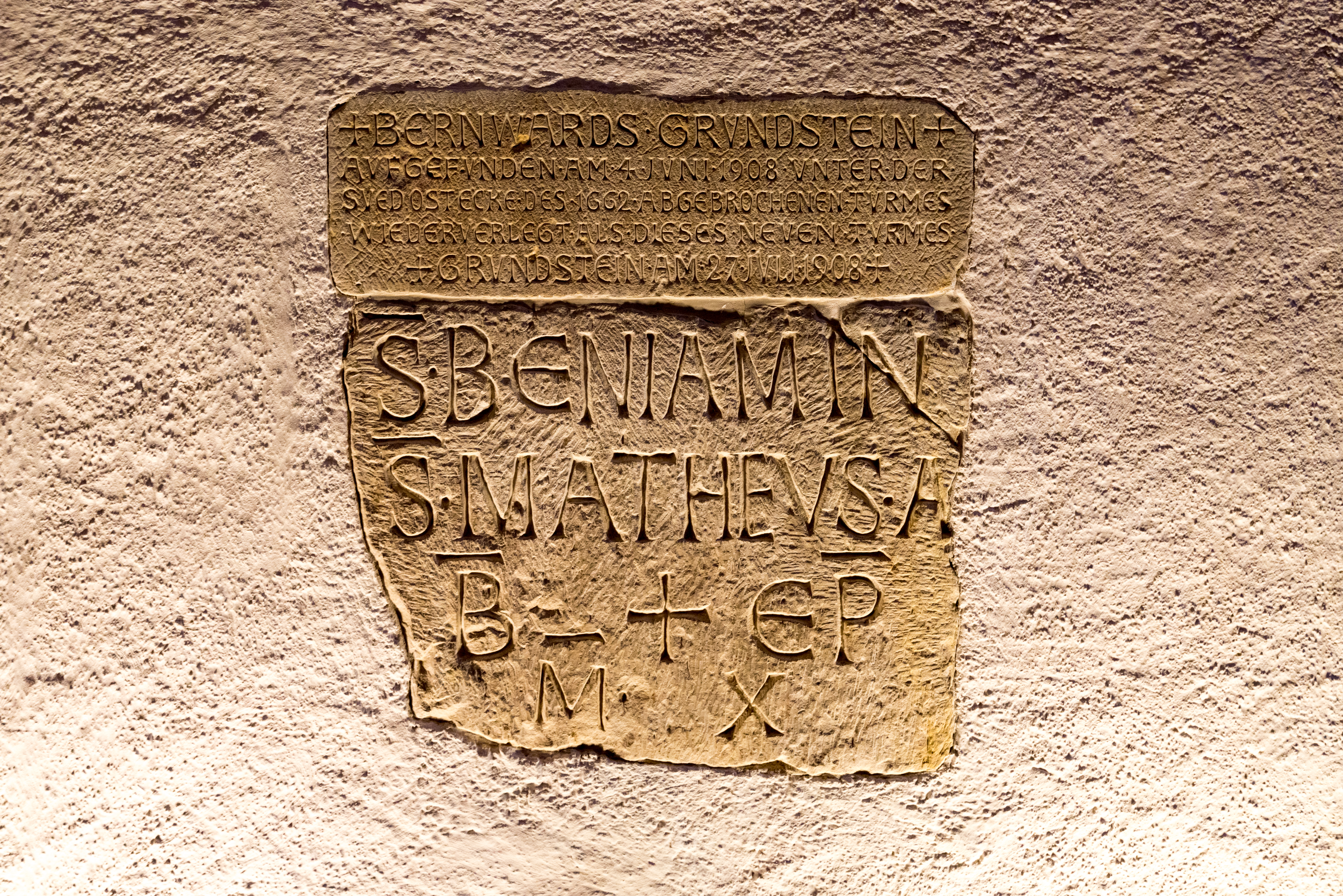 Hildesheim, Michaelisplatz, St. Michaelis, Grundstein von 1010.